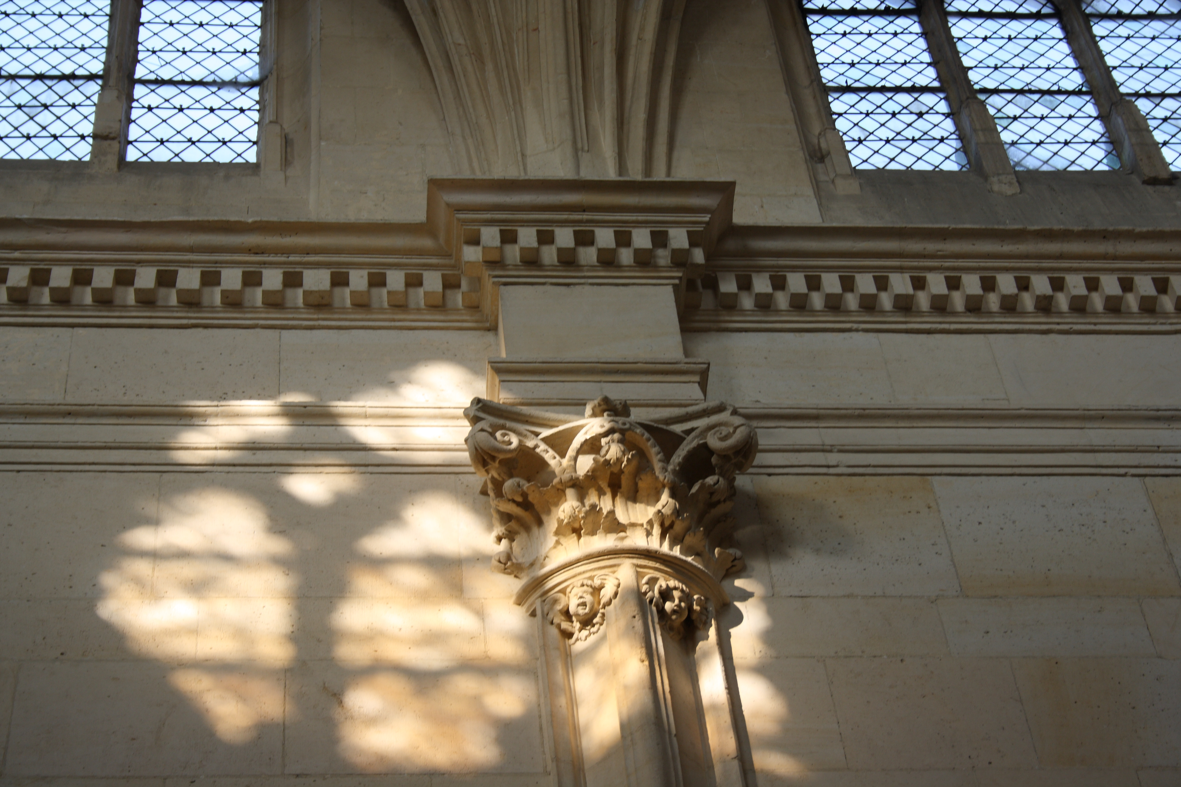 Kirche Saint-Didier in Villiers-le-Bel, Kapitell